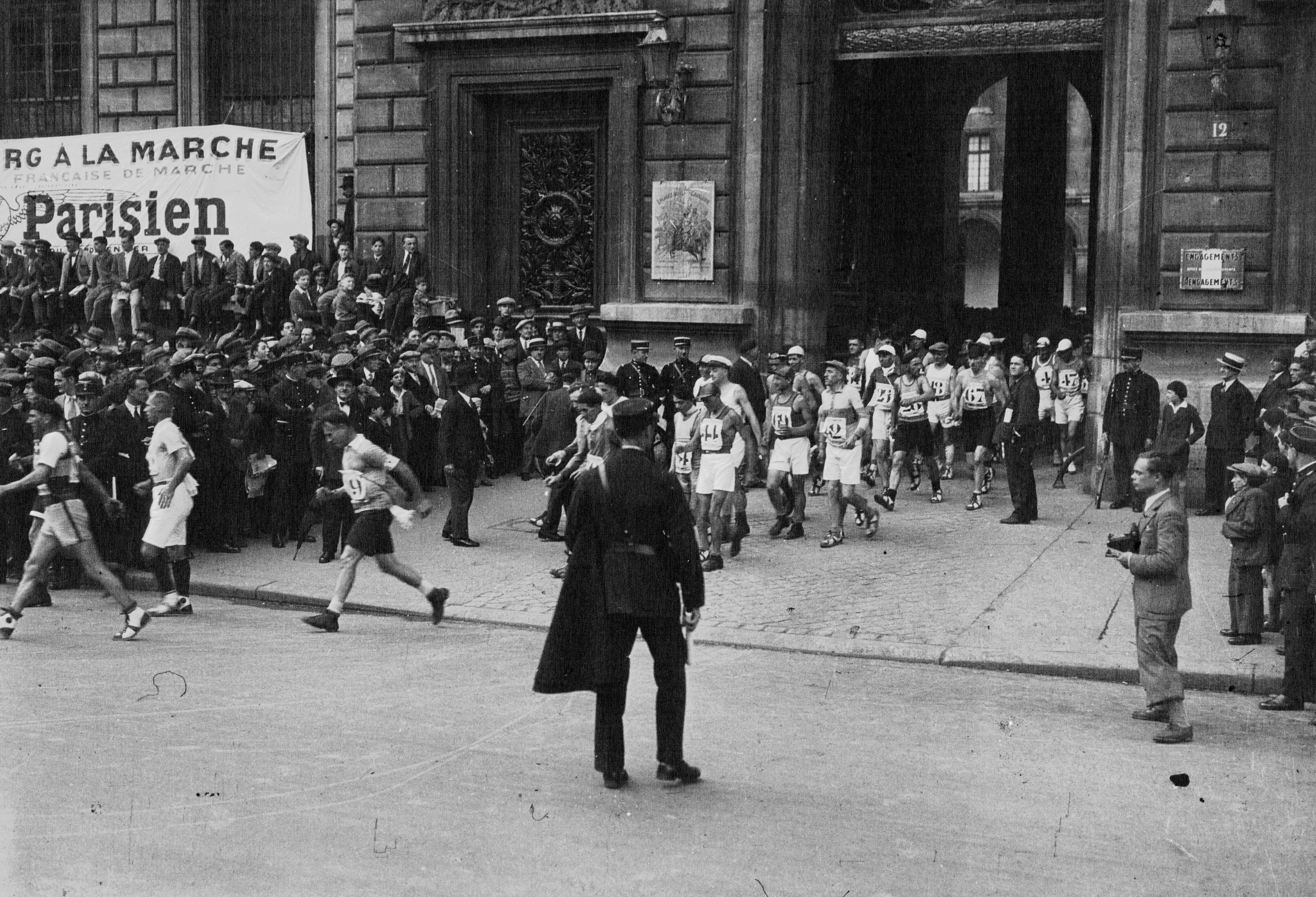 Le départ des 500 km de marche, de la course Paris-Strasbourg 1932 : photographie de presse